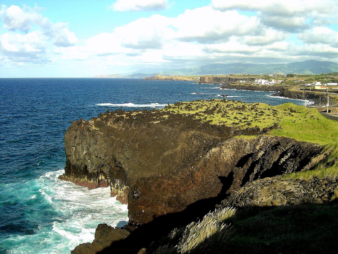 Litoral a Leste de Capelas (Portugal)